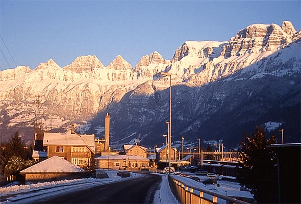 Bahnhof von Flums, fotografiert am 1. Januar 2002